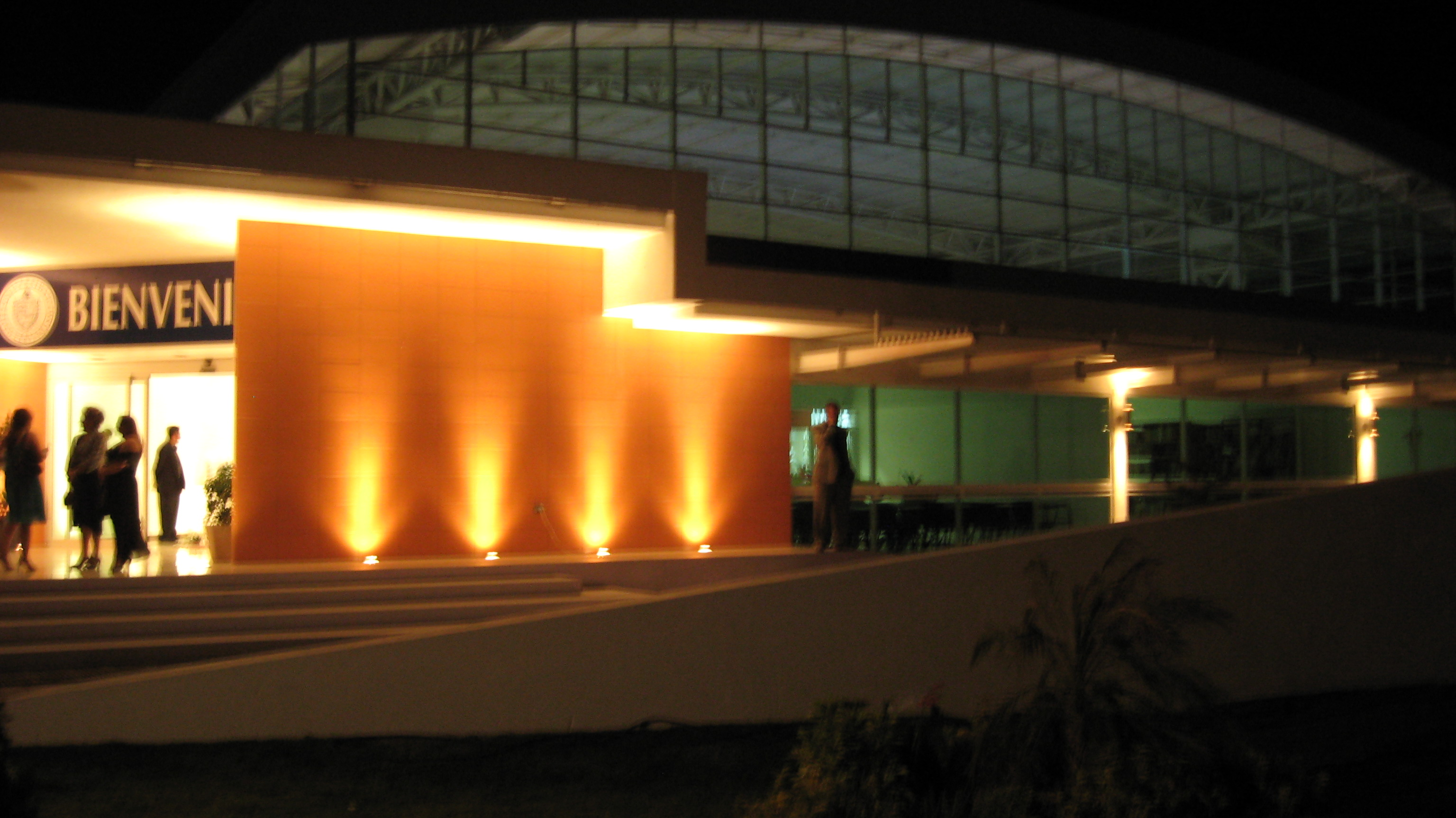 edificio polifuncional campus ULC irapuato